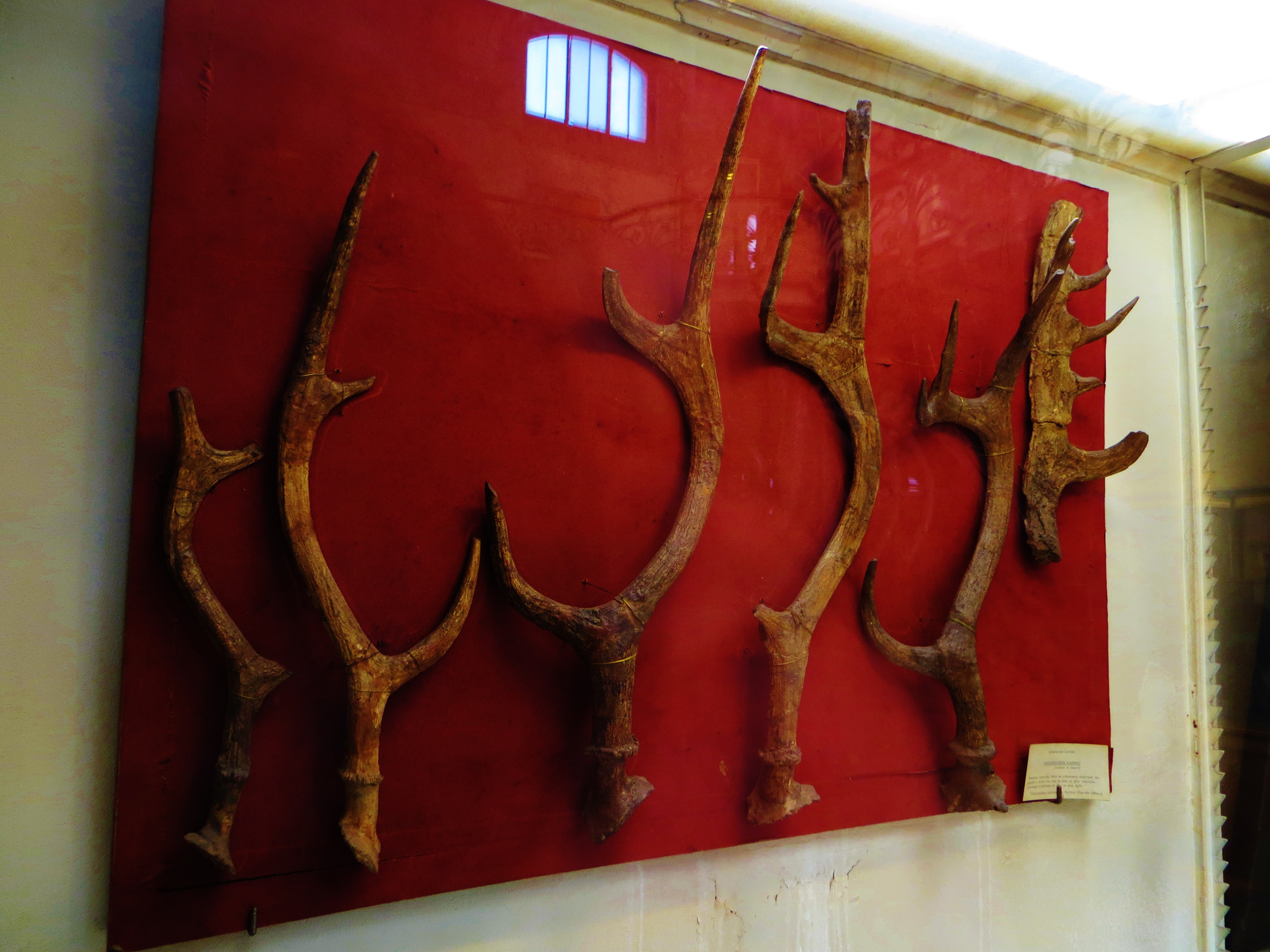 Fossil of Croizetoceras, an extinct mammal - Took the photo at Musee d'Histoire Naturelle, Paris